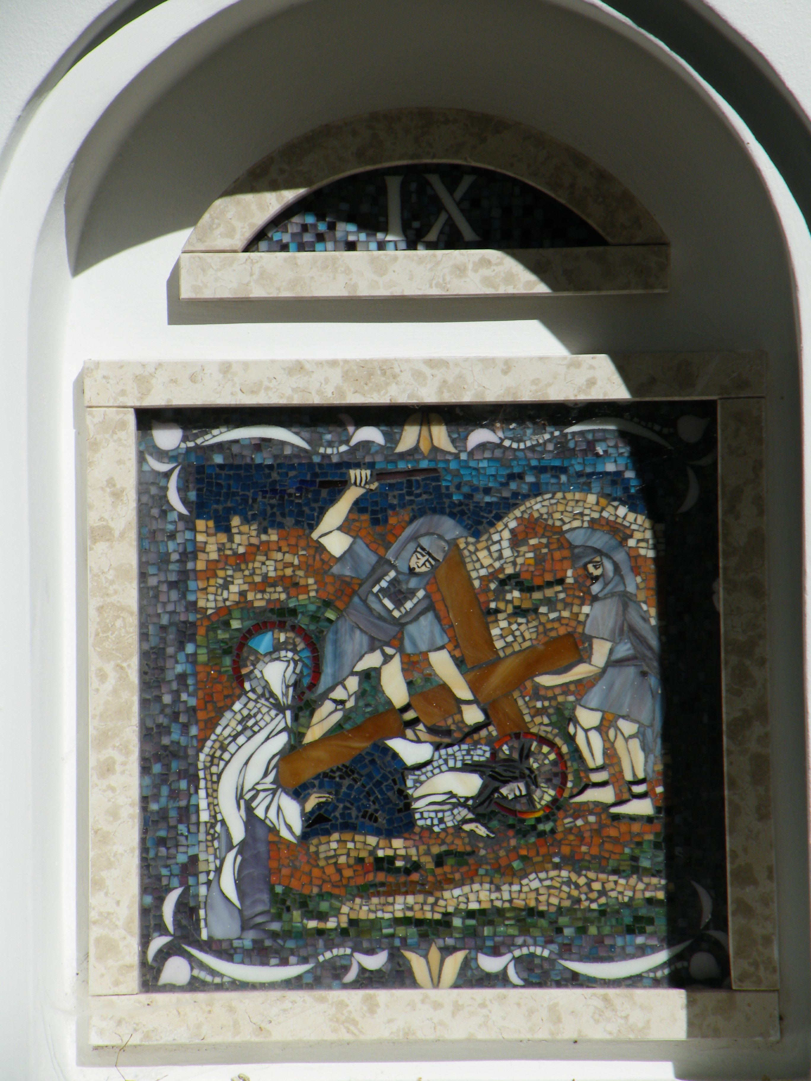 Stációk a Palóc ligetben, Balassagyarmaton